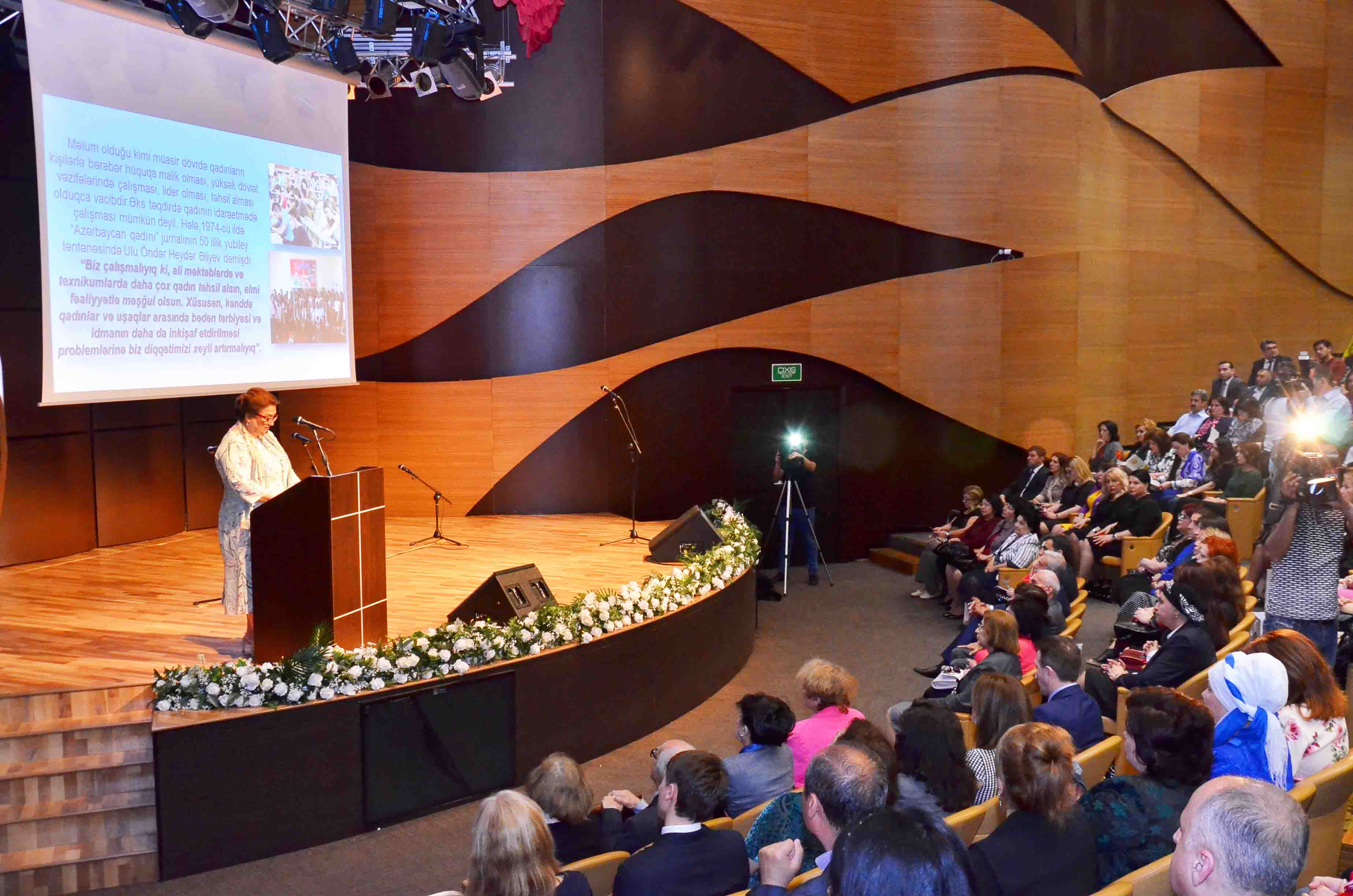 Cümhuriyyətə İşıq Saçan Qadınlar